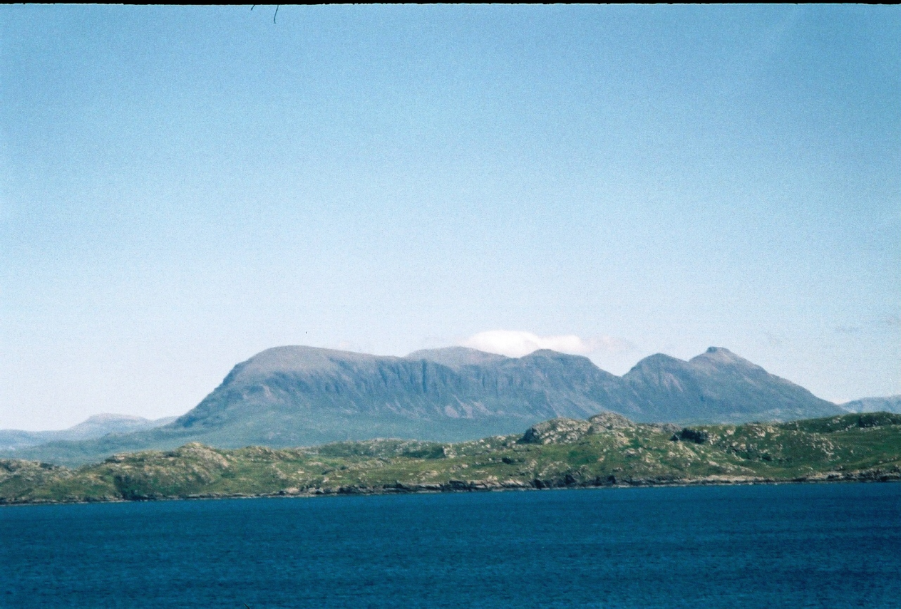 Gemaakt door Pieter Cooman in de zomer van 2005.